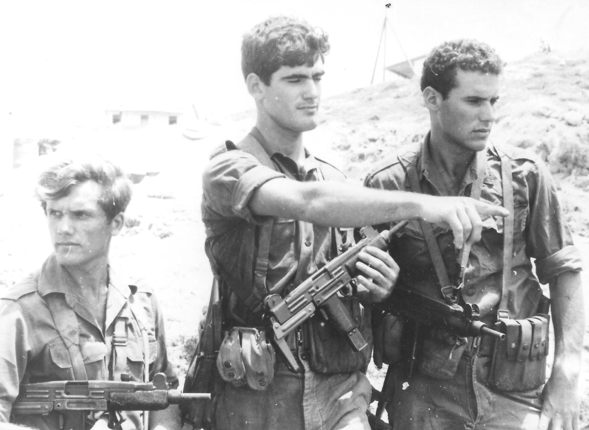 פושטים שחיינים של שייטת 13 בחגור וטלפיים